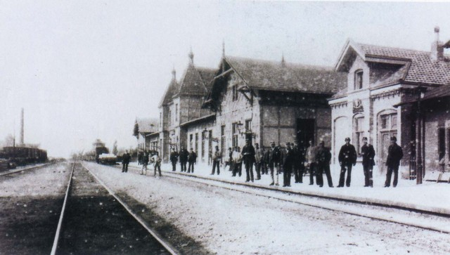 Station Oldenzaal in 1885 (Collectie Stationsweb.nl)